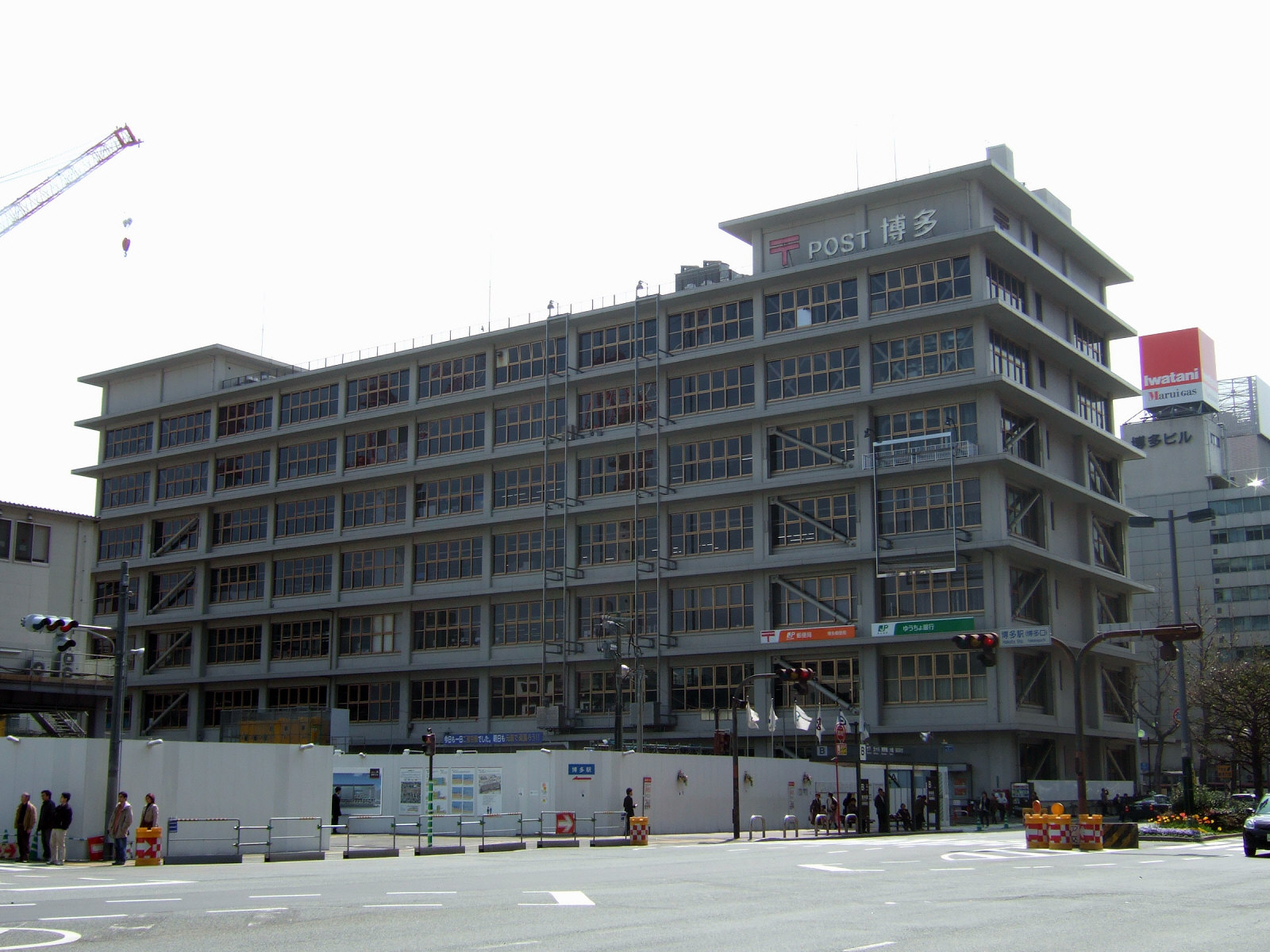 博多郵便局庁舎（Hakata Postoffice）